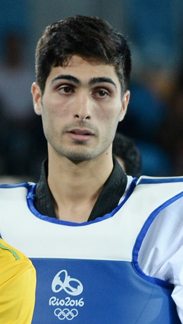 Milad Beygi 2016 Rio Olimpiadasında